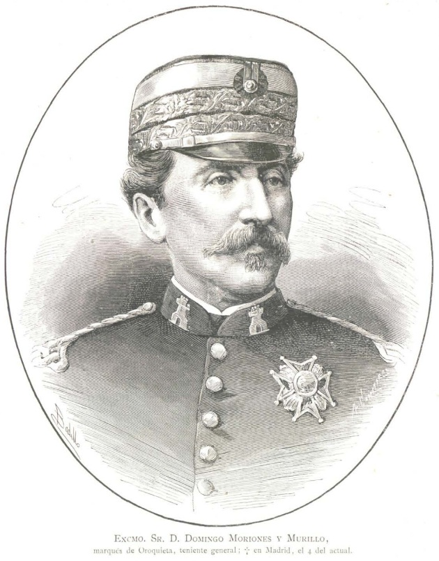 Excmo. sr. D. Domingo Moriones y Murillo, marqués de Oroquite, teniente general, falleció en Madrid el 4 del actual